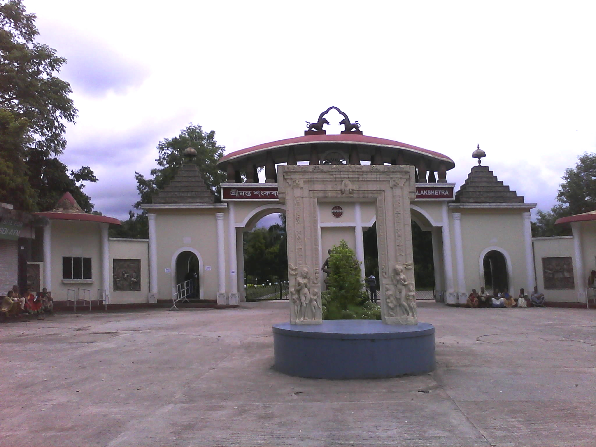 অসমীয়া: কলাক্ষেত্ৰৰ প্ৰৱেশদ্বাৰ